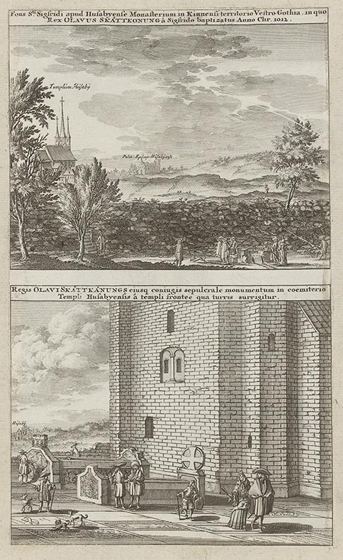 Titel i översättning Sankt Sigfrids källa vid Husaby kloster i Kinne härad i Västergötland, i vilken Olof Skötkonung döptes av Sigfrid år 1012. Konung Olof Skötkonung och hans gemåls gravvårdar på Husaby kyrkogård vid den sida av kyrkan, där tornet reser sig